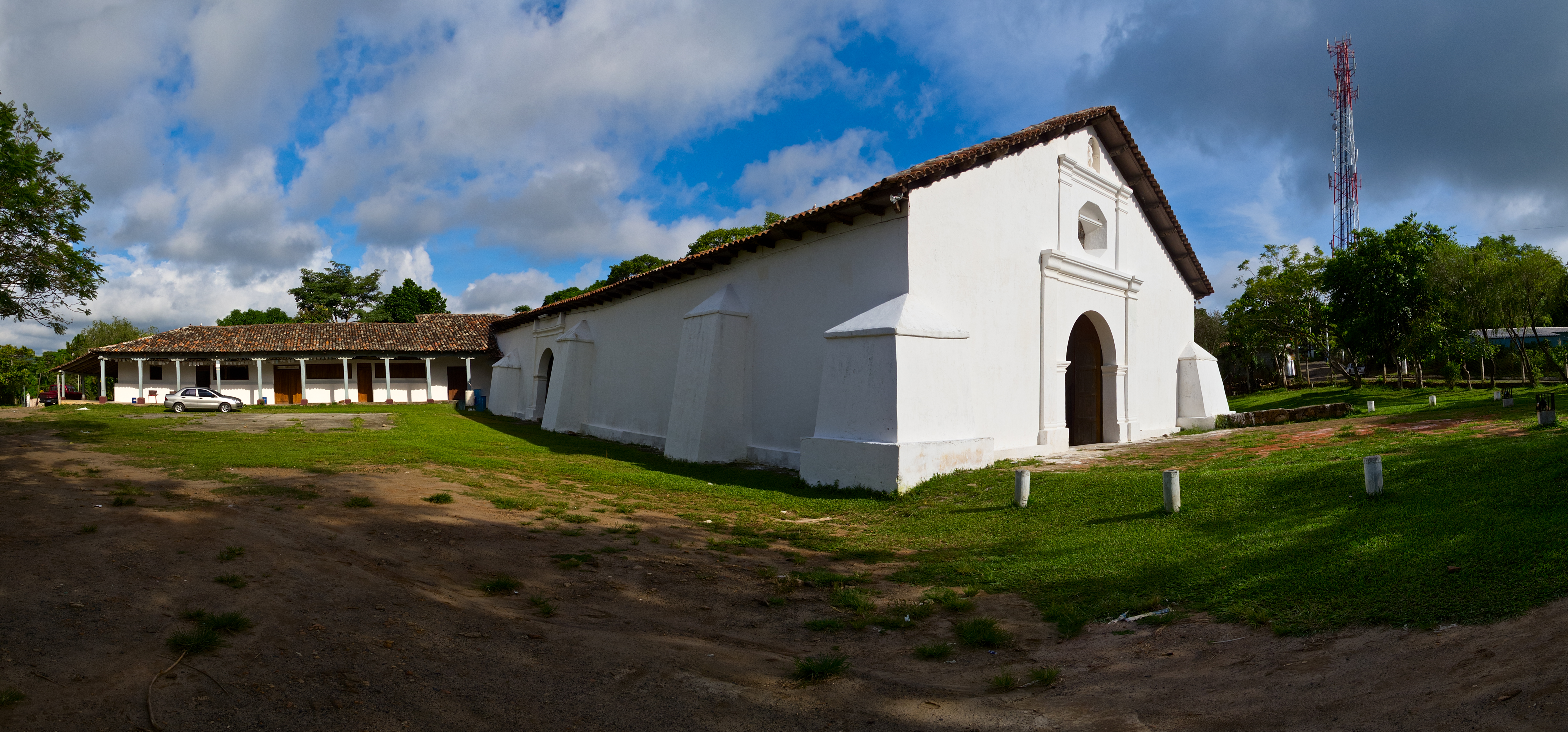 Iglesia de Huizucar